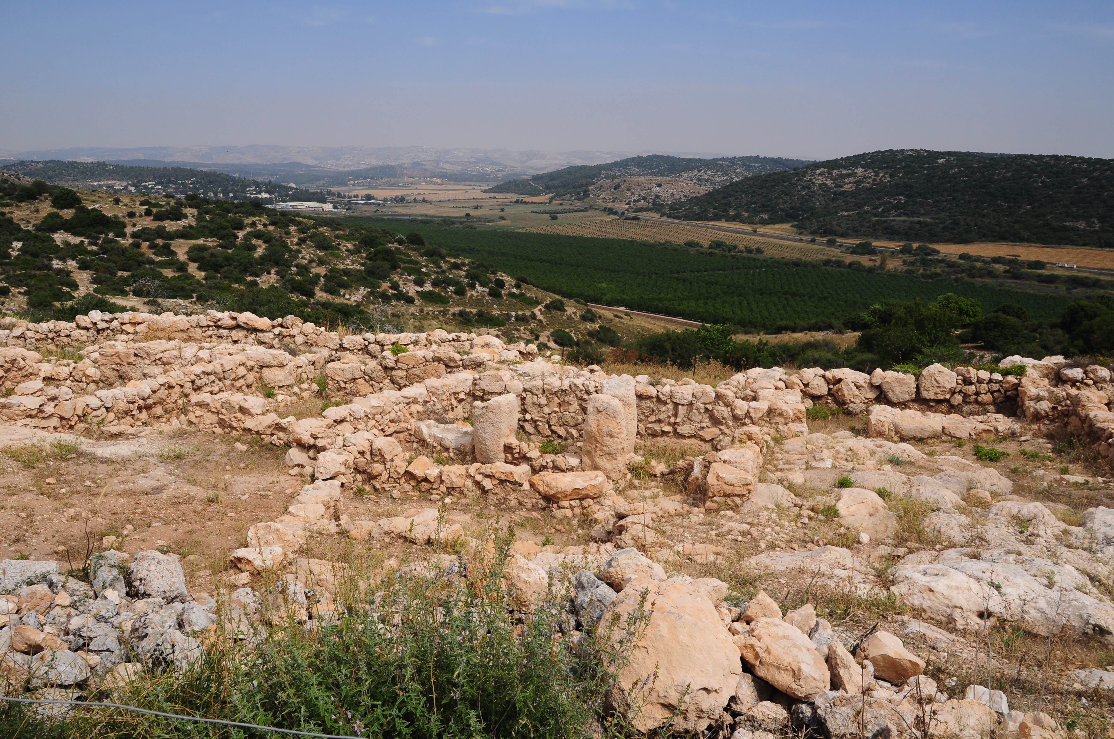 17449 Khirbet Qeiyafa